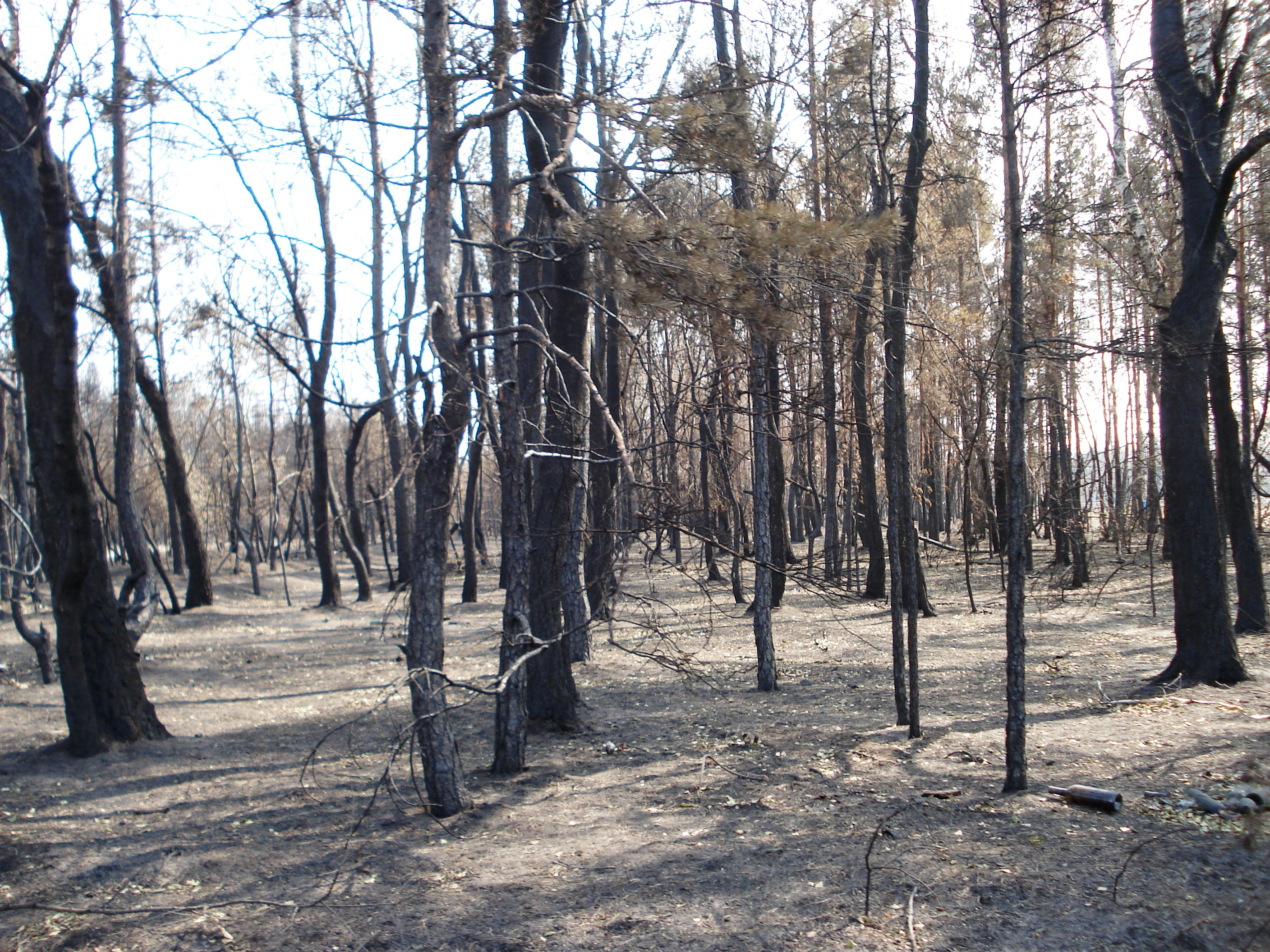 Выгоревший лес в Масловке